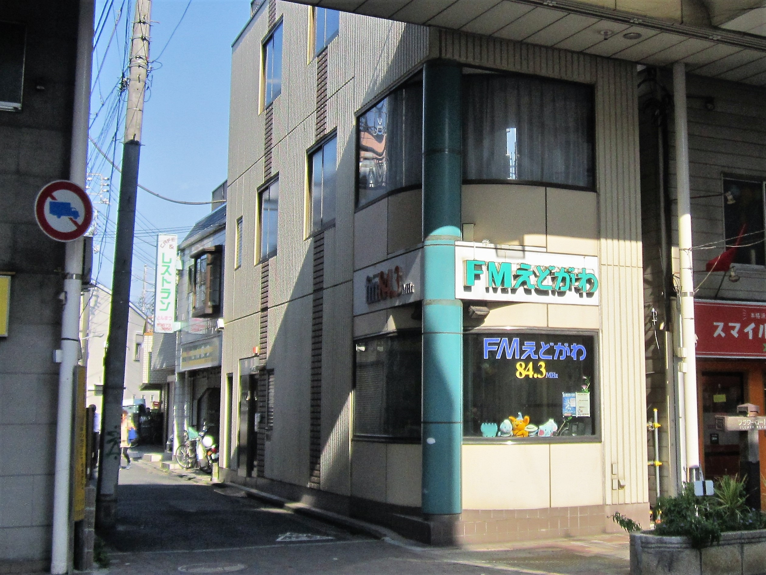 エフエム江戸川